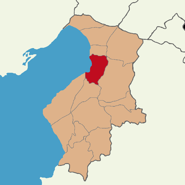 İskenderun ilçesinin konumu